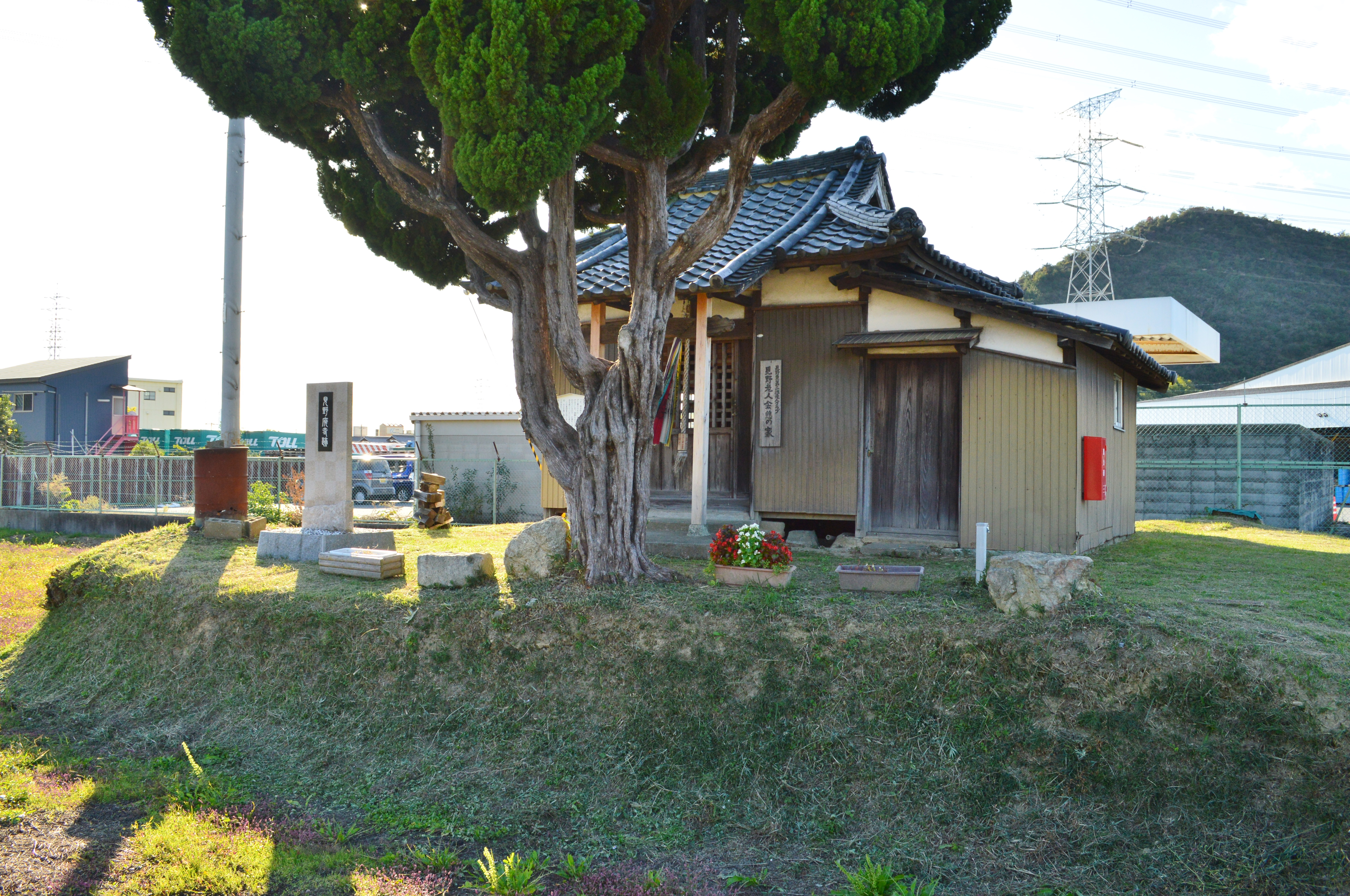 見野廃寺跡 概観